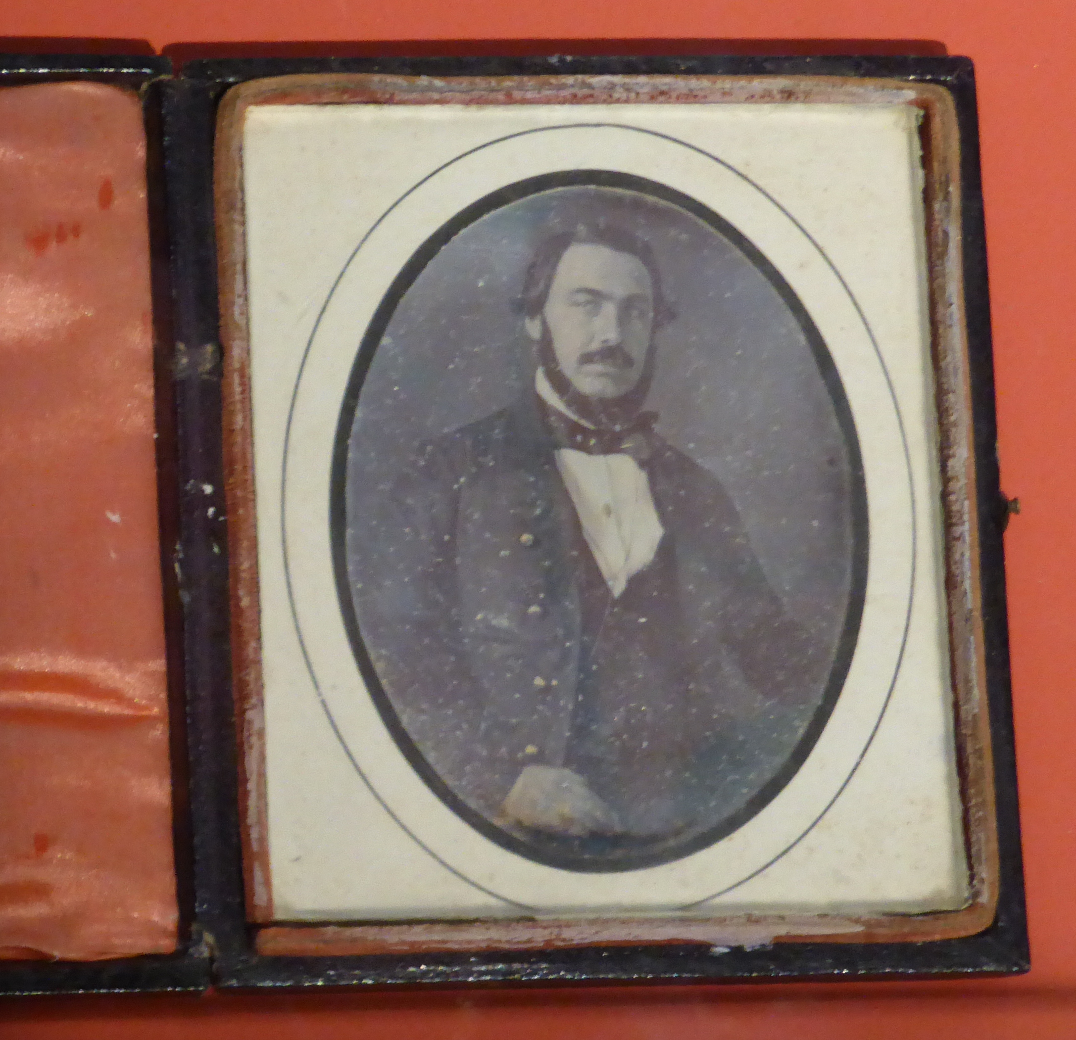 En la colección de daguerrotipos del Museo de Colchagua, o de Santa Cruz, en Chile, se conserva este retrato del diputado Juan Esteban Rodríguez Segura, único hijo conocido del patriota Manuel Rodríguez Erdoíza. La fecha probable de este daguerrotipo podría ser entre los años 1846 y 1852, atendiendo al tipo de estuche, que es sencillo, de primera época.